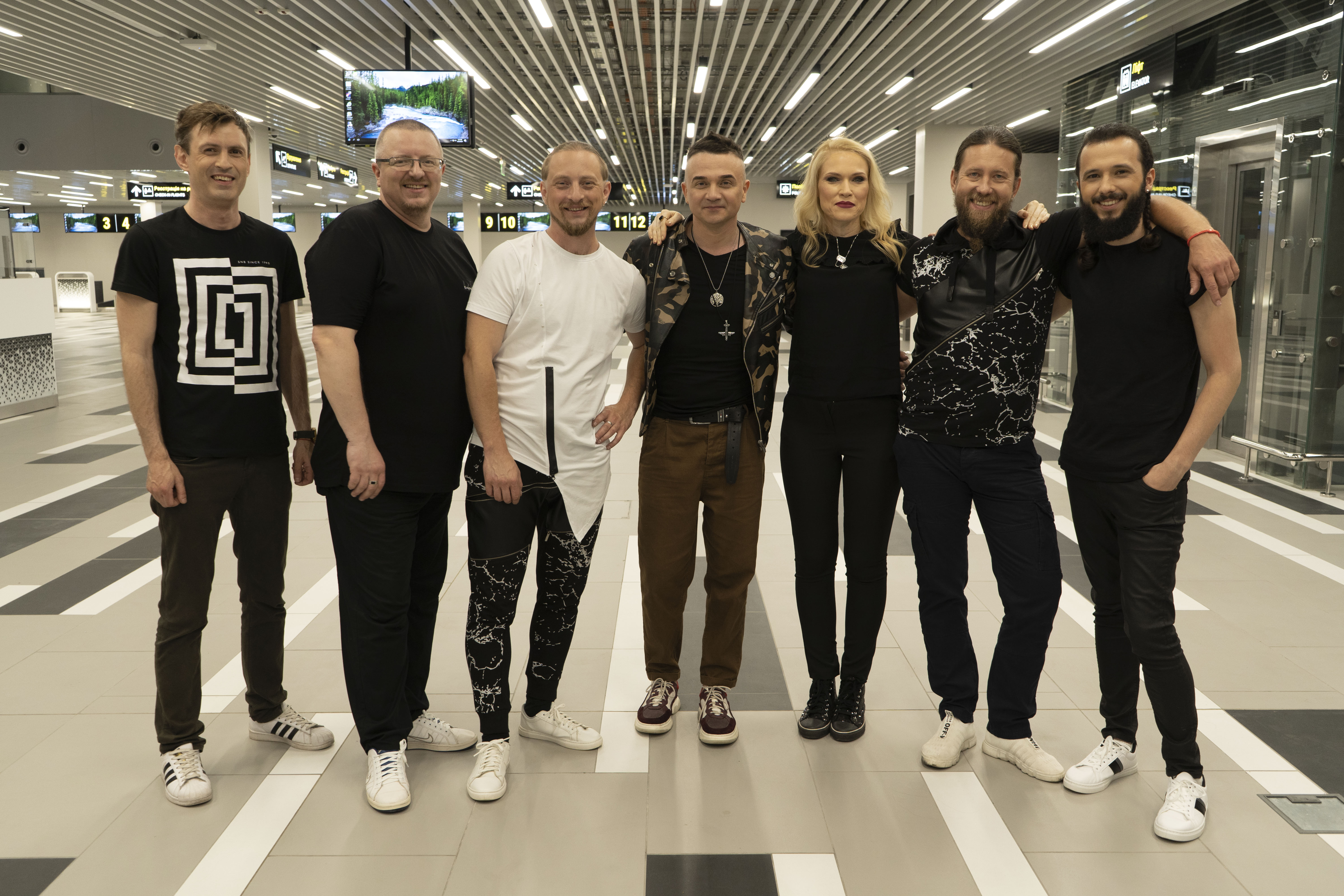 Фото участников группы Хорта во время съемок клипа